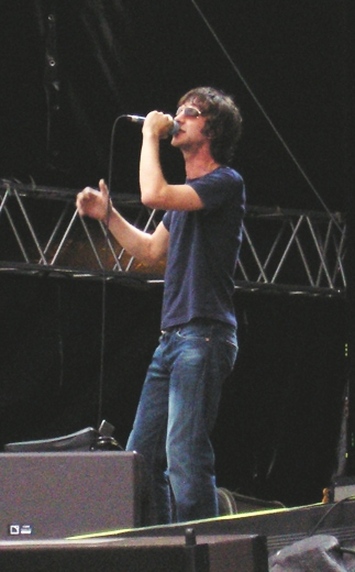 Richard Ashcroft als Voract der Coldplay-Deutschlandkonzerte in Köln